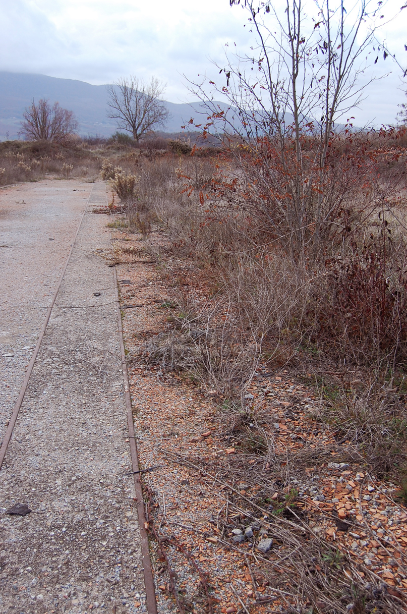 Quel che resta dei binari oggi. Lo sguardo si rivolge alle vecchie cave.